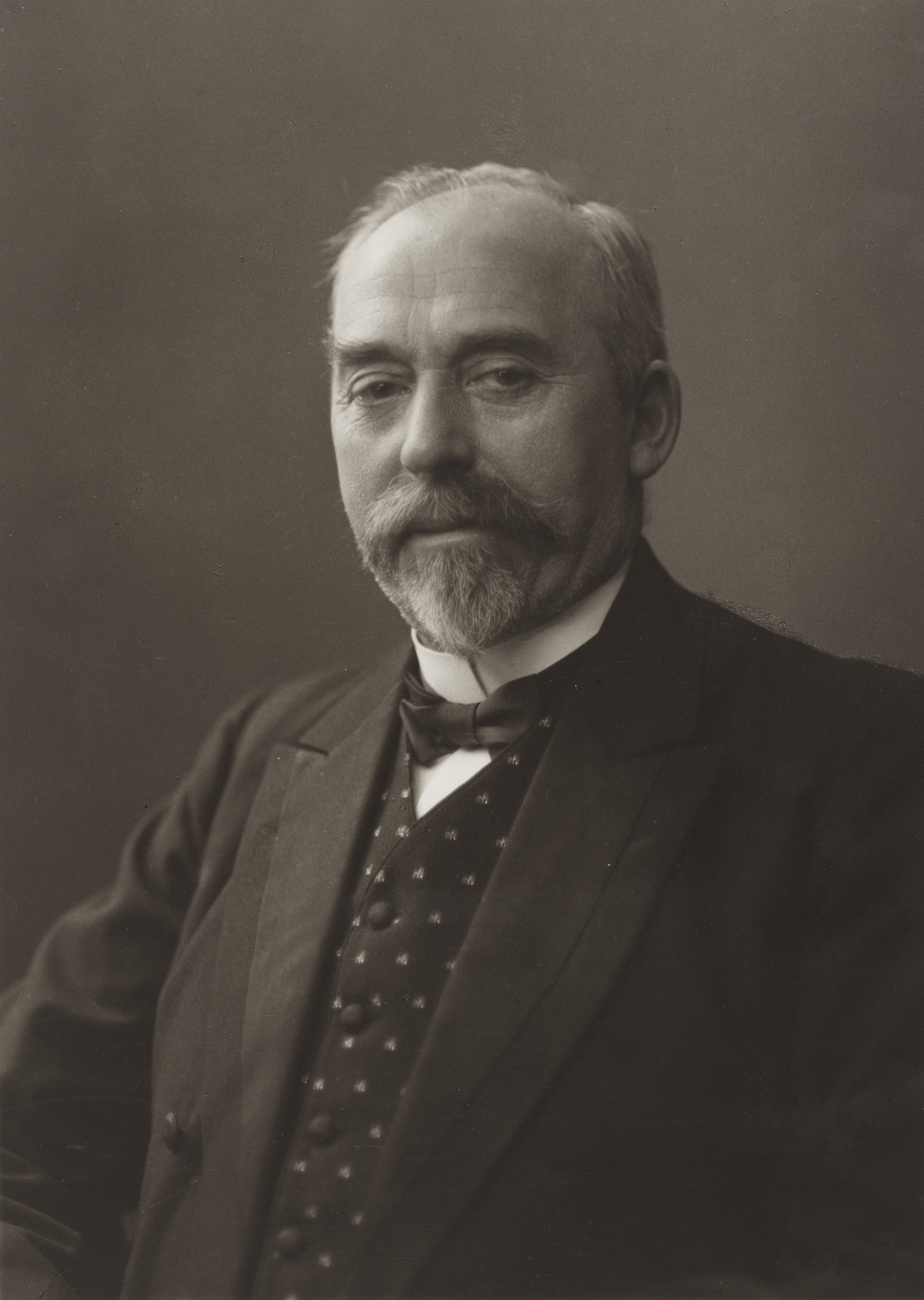 Jens Jensen-Sønderup (1862 i Sønderup -1949), dansk politiker og minister. Han var medlem af Folketinget 1896-1910 og 1911-1920. I Ministeriet J.C. Christensen var han minister for offentlige arbejder, og samme stilling havde han i Ministeriet Neergaard I 1908-1909. I Ministeriet Klaus Berntsen 1910-1913 var han indenrigsminister.